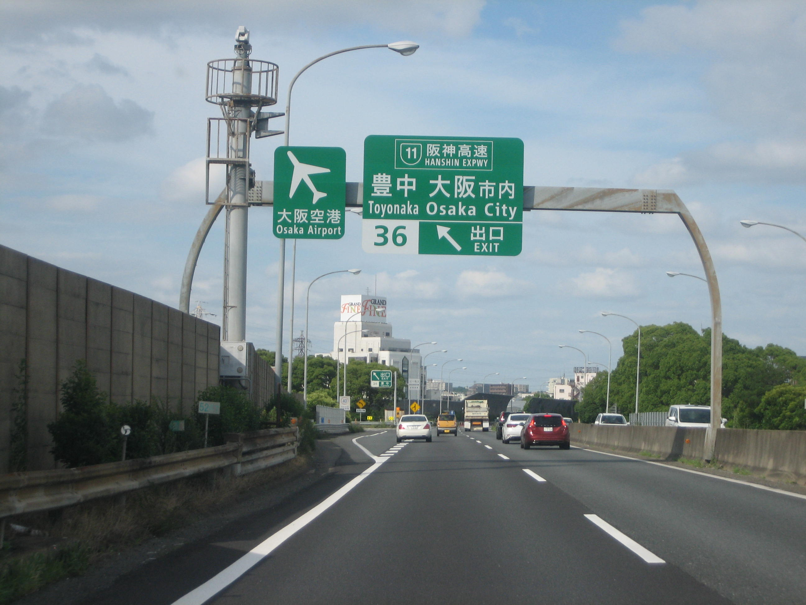 豊中ICの上り線出口